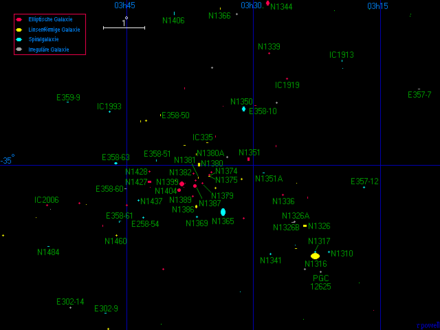 Karte des Fornax-Galaxienhaufens mit deutscher Legende